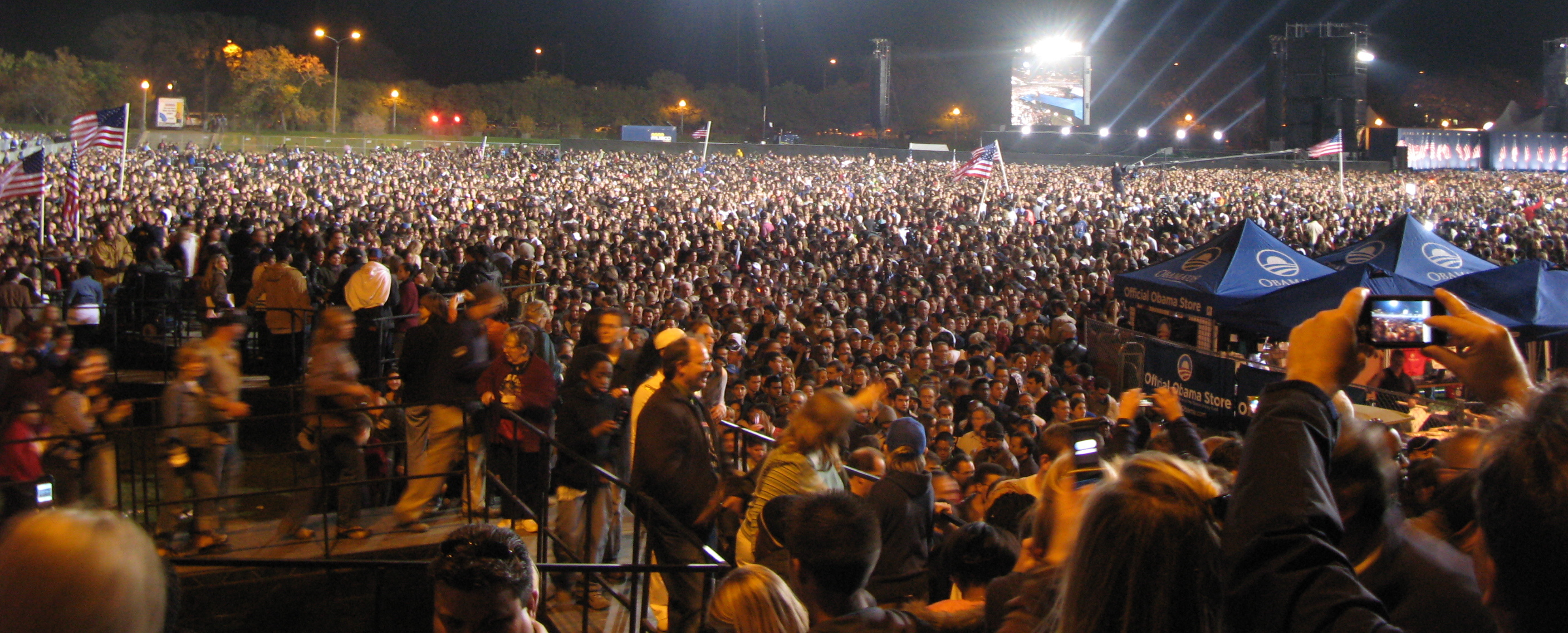 awesome